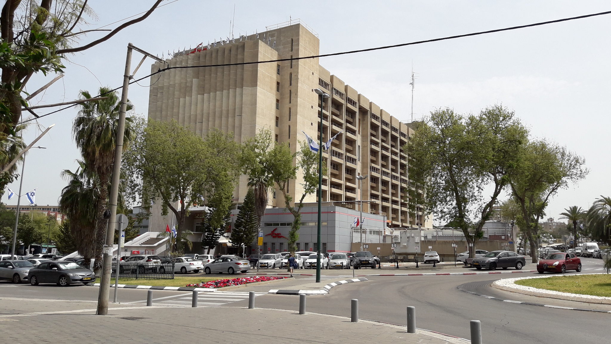 מרכז מיון הדואר הארצי הישן